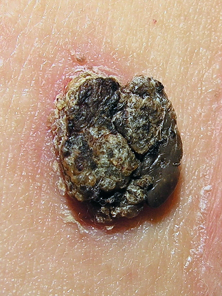 Queratose seborreica